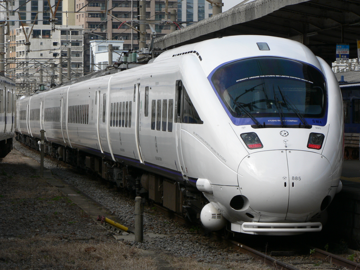 青帯・新エンブレムに変更されたJR九州885系SM4編成。